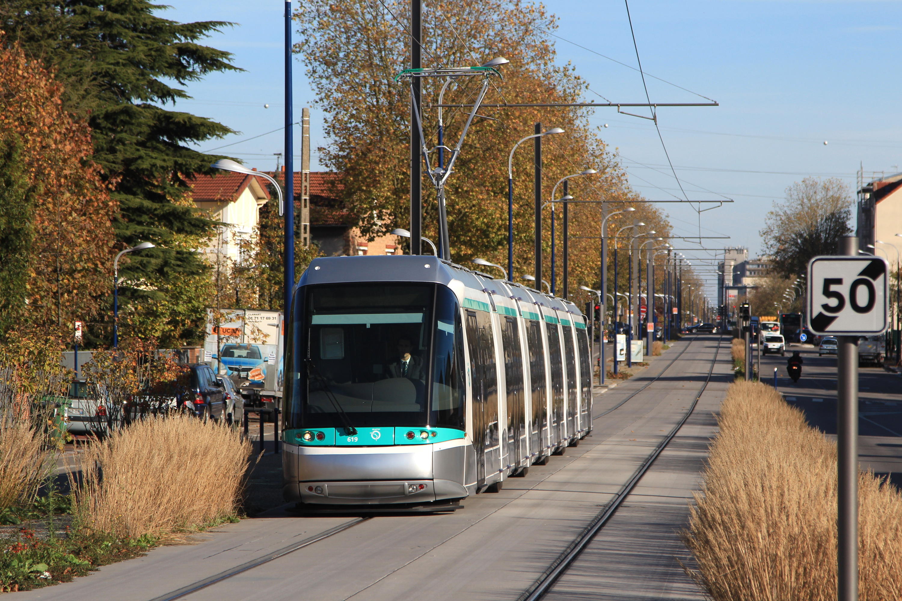 Un tramway de la ligne 6 à l'approche de la station « Hôpital Béclère » lors d'essais.